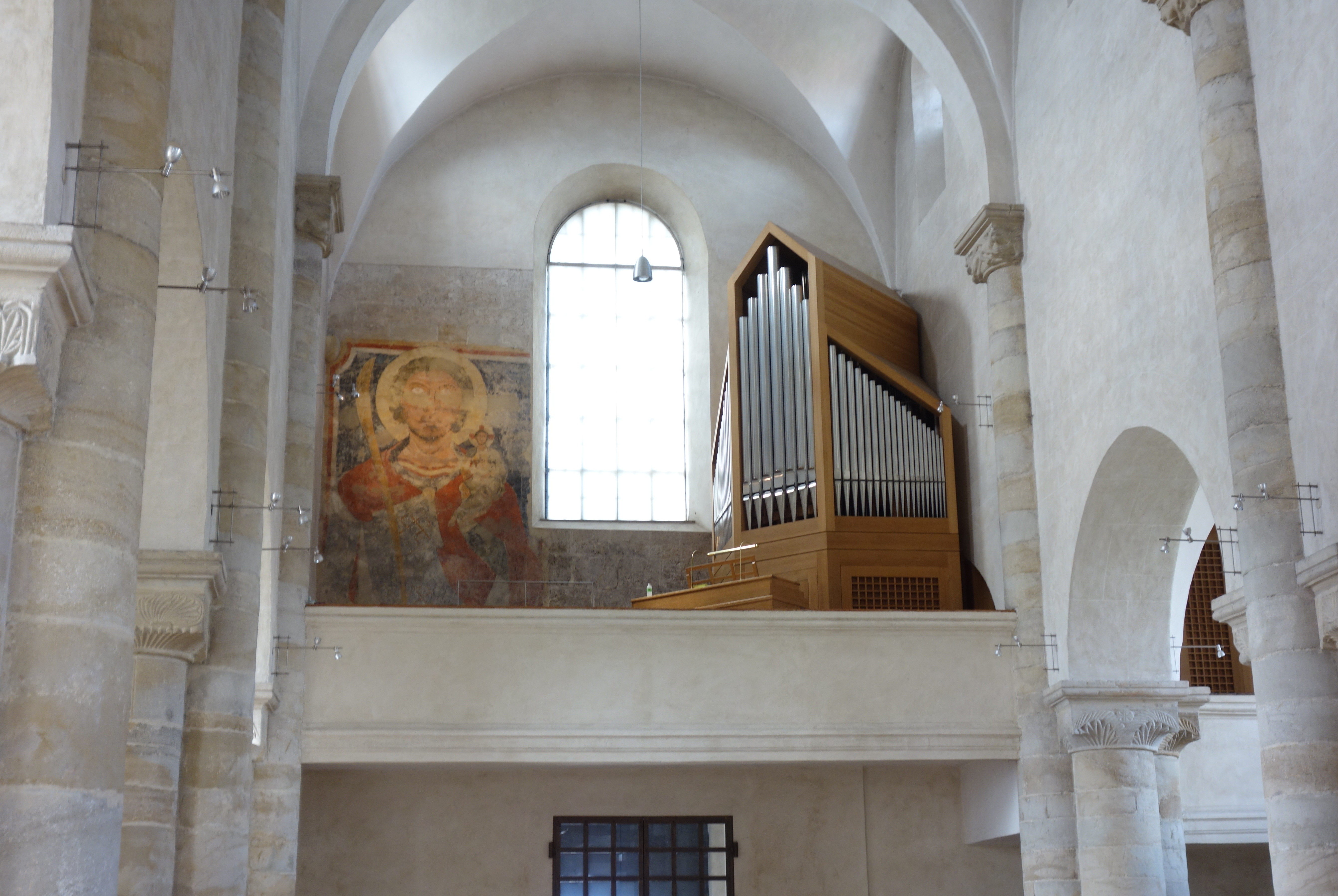 Orgel von St. Michael in Altenstadt (Oberbayern) (1998, Orgelbau Link, II/29)